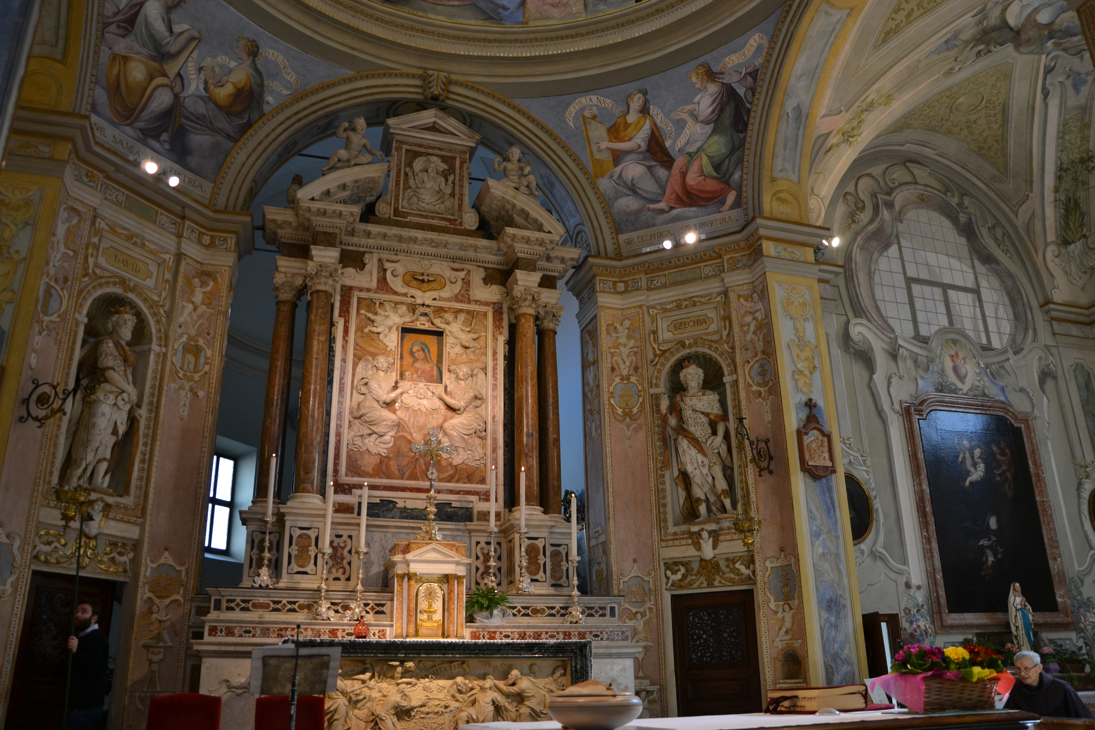 Santa Maria di Canepanova (Pavia) (1492 - sec. XVII)